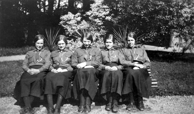 Wallinums elitpatrull på Södertuna, 1915